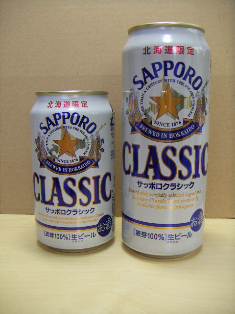 缶350ml･缶500ml